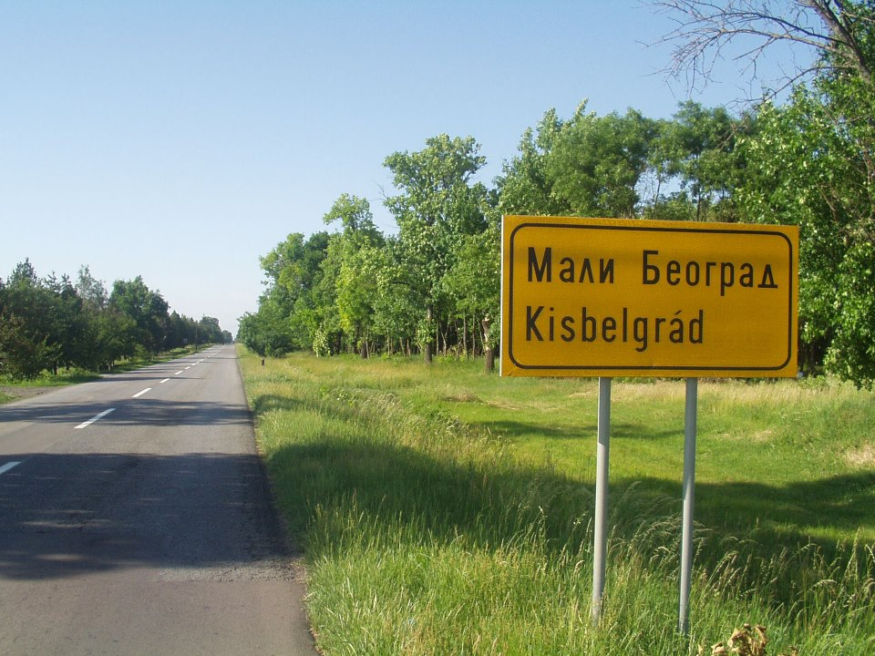 Začátek obce Mali Beograd nedaleko Bačky Topoly ve Vojvodině, Srbsko